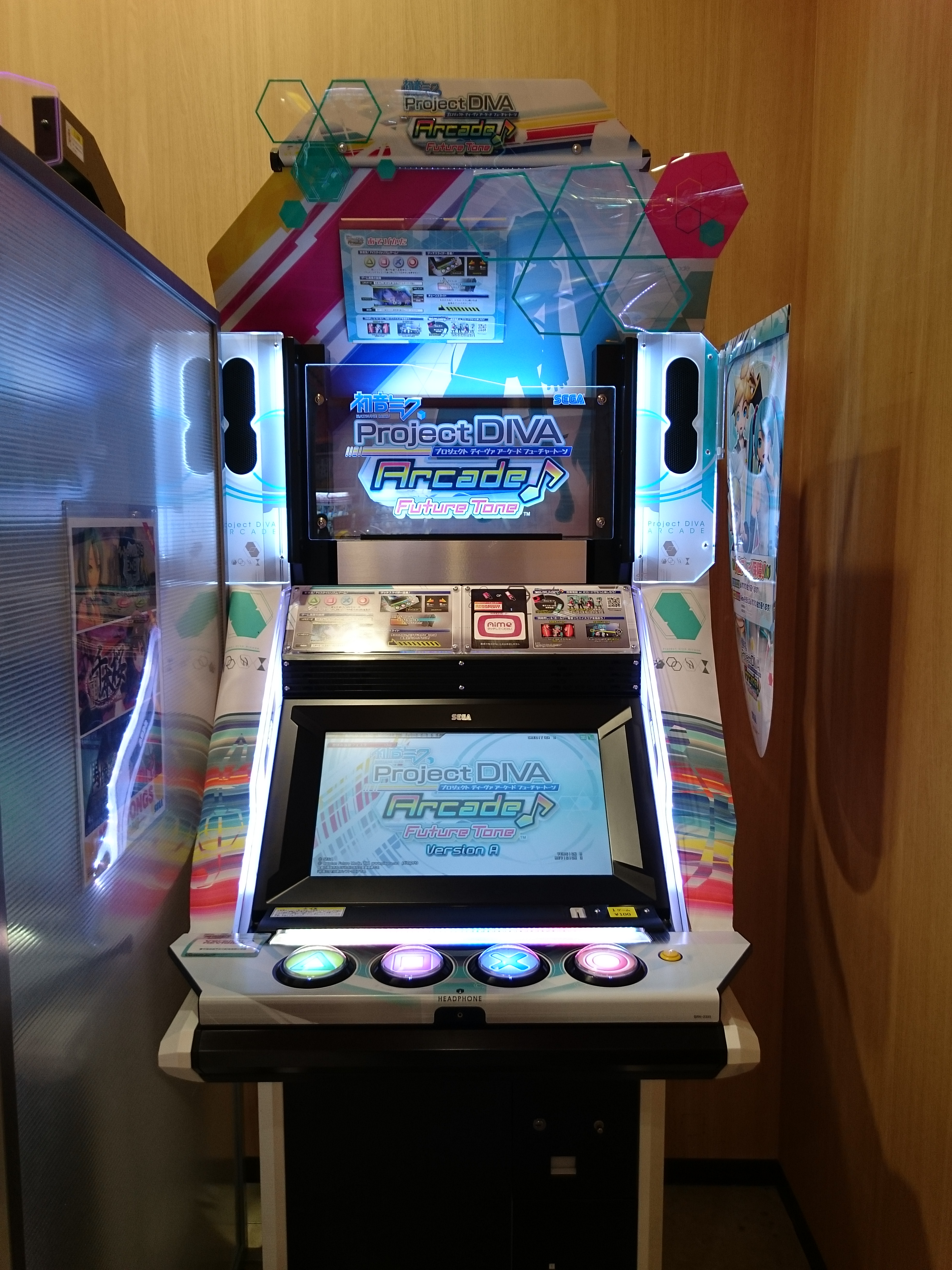 『初音ミク Project DIVA Arcade Future Tone Version A』筺体。